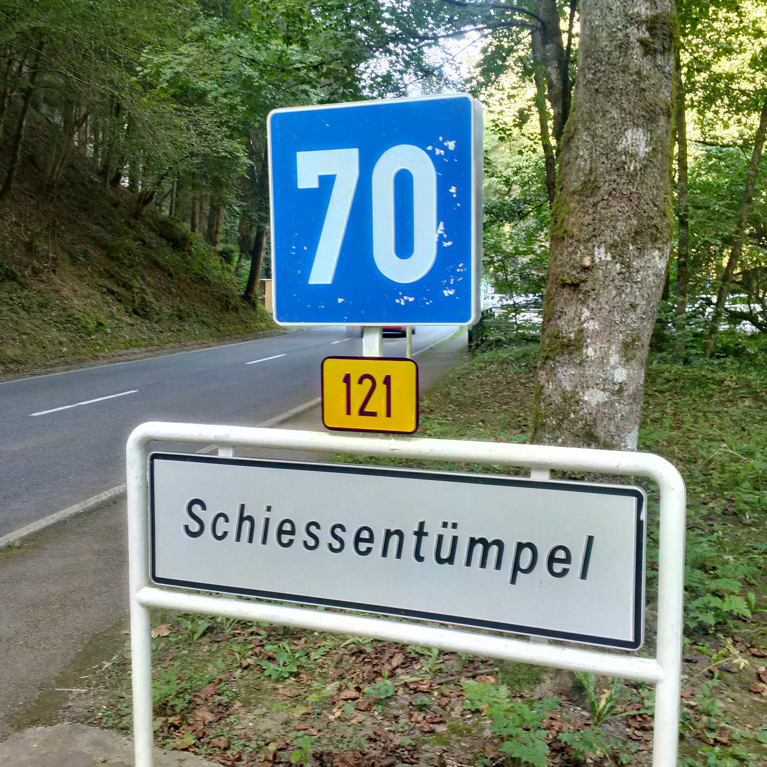 Lieu-dit Schéissendëmpel